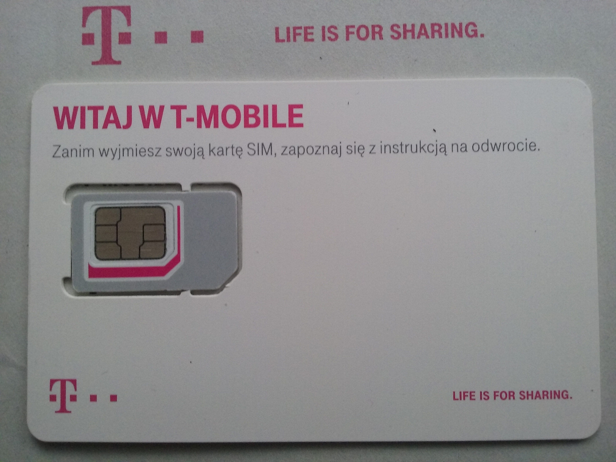 SIM card T–Mobile Poland